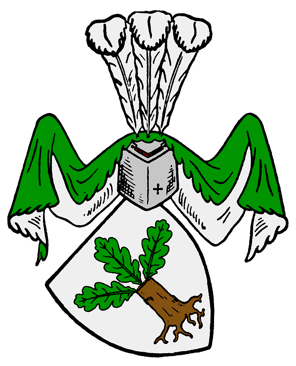 Stammwappen derer von Gentzkow